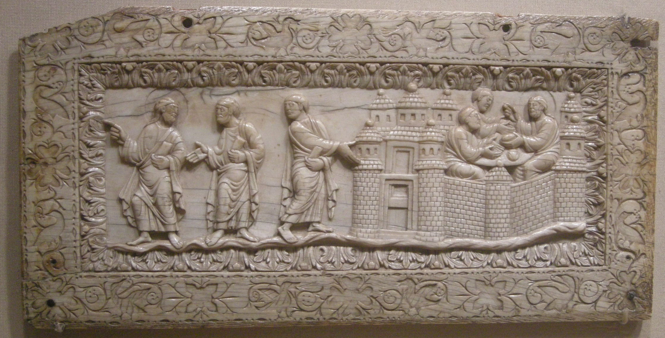 Plaque d'ivoire avec scène d'Emmaüs, vers 850-900 (carolingien), de Lotharingie (Metz)